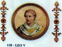 Pope Leo V